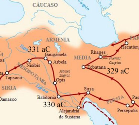 Mapa Zoom sobre la 2º etapa de las conquistas de Alejandro Magno, Asia Menor y Egipto. Alexander The Great battles and campaigns, rutes